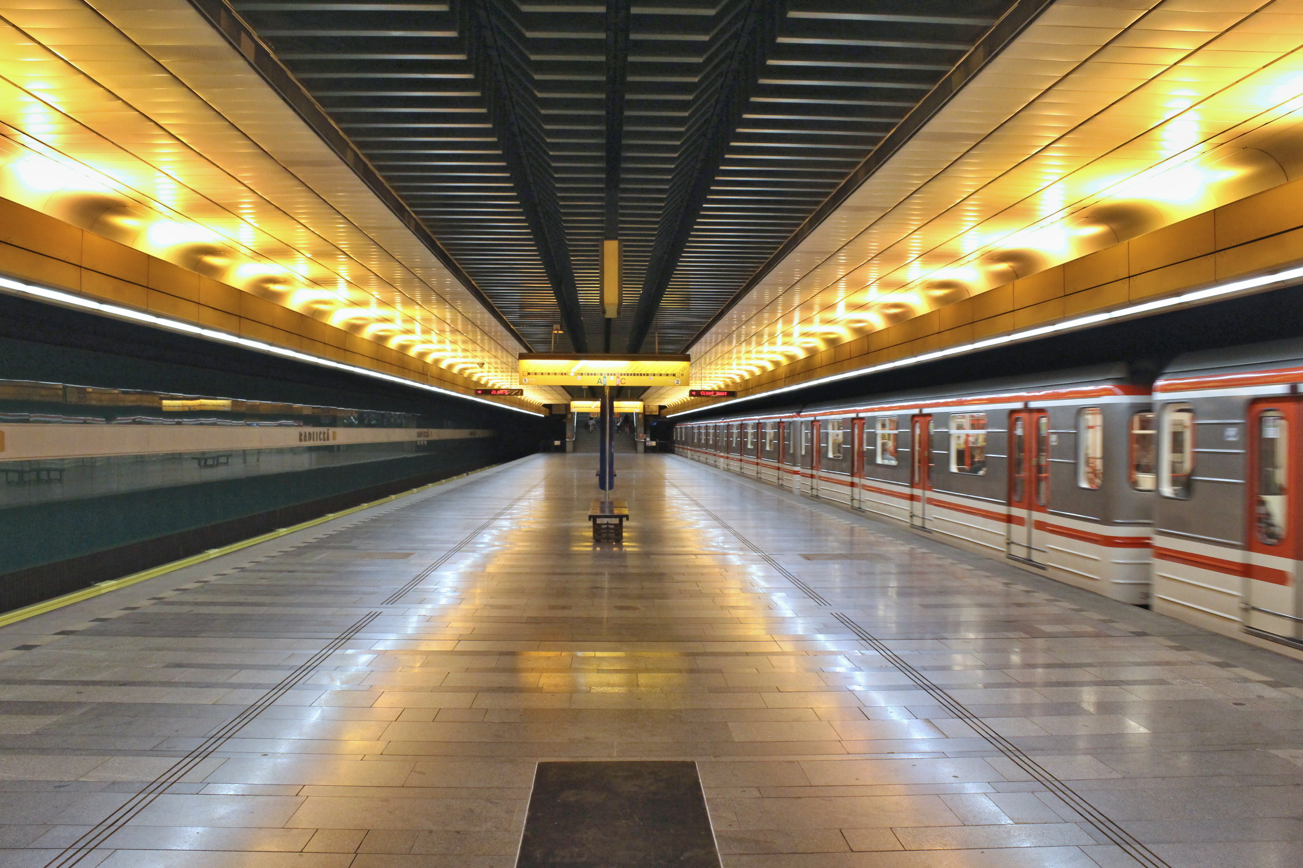 Stanice pražského metra, trasa B, Radlická